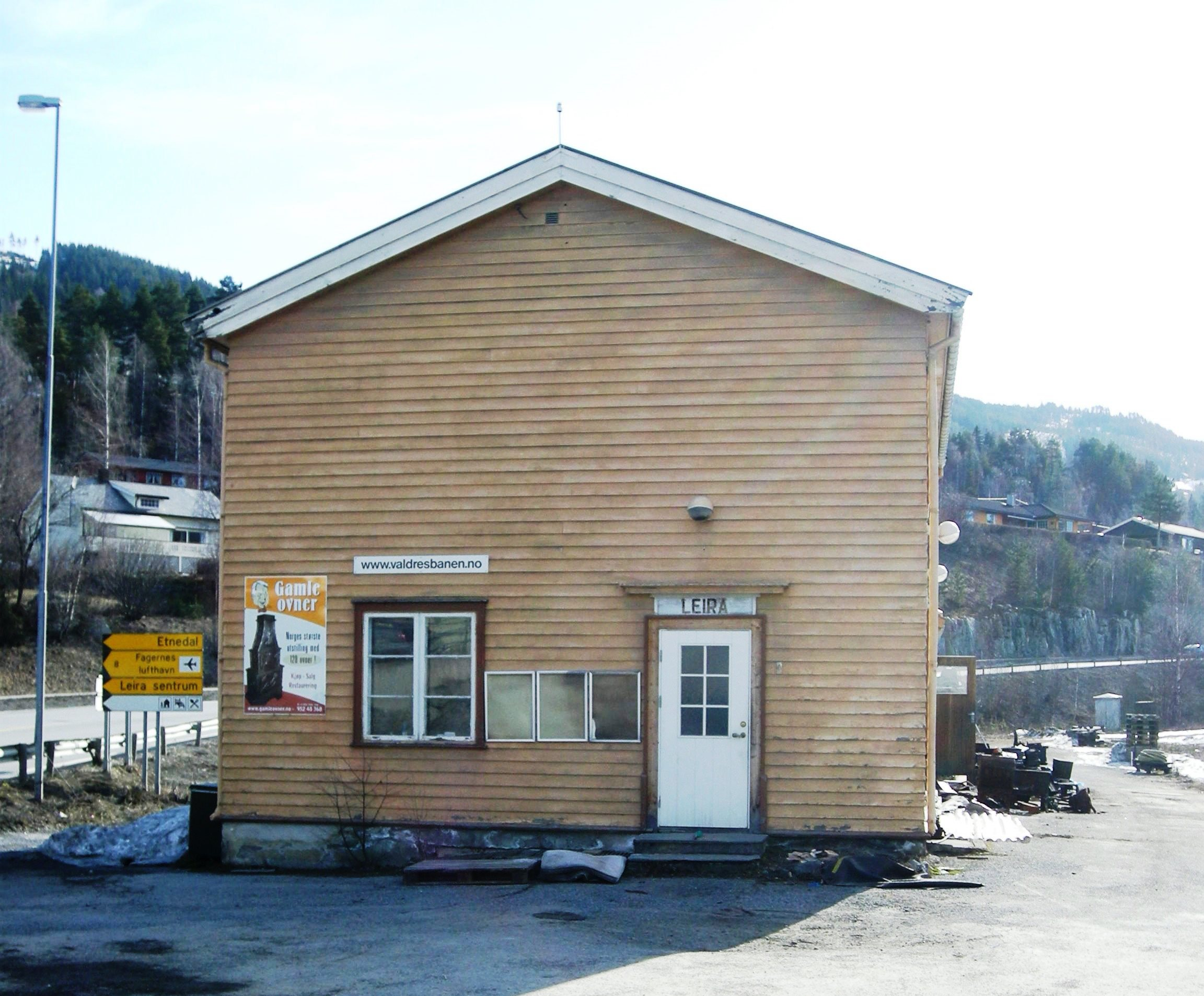 Leira stasjon på den nedlagte Valdresbanen